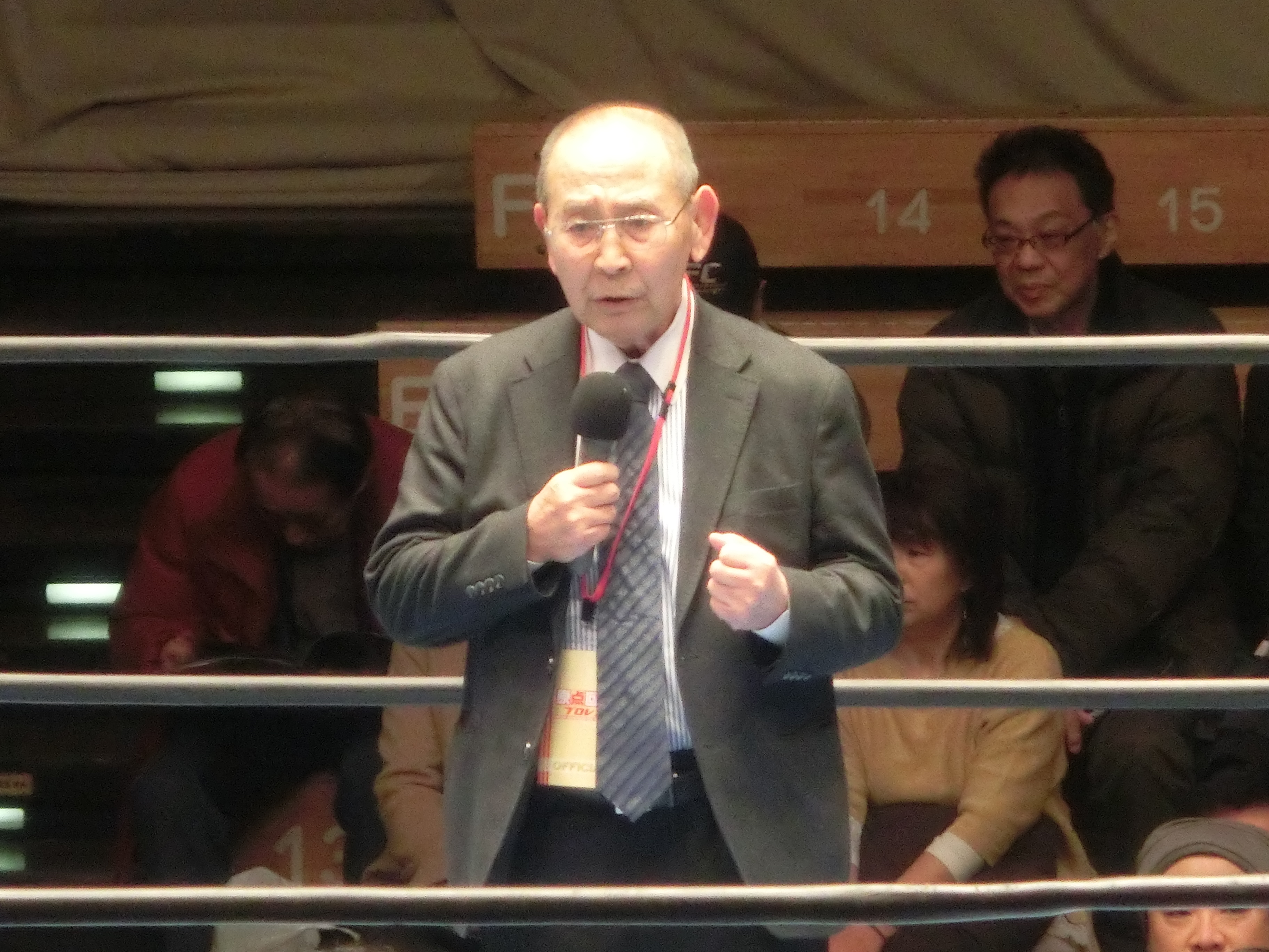 SHINMAHISASHI2017